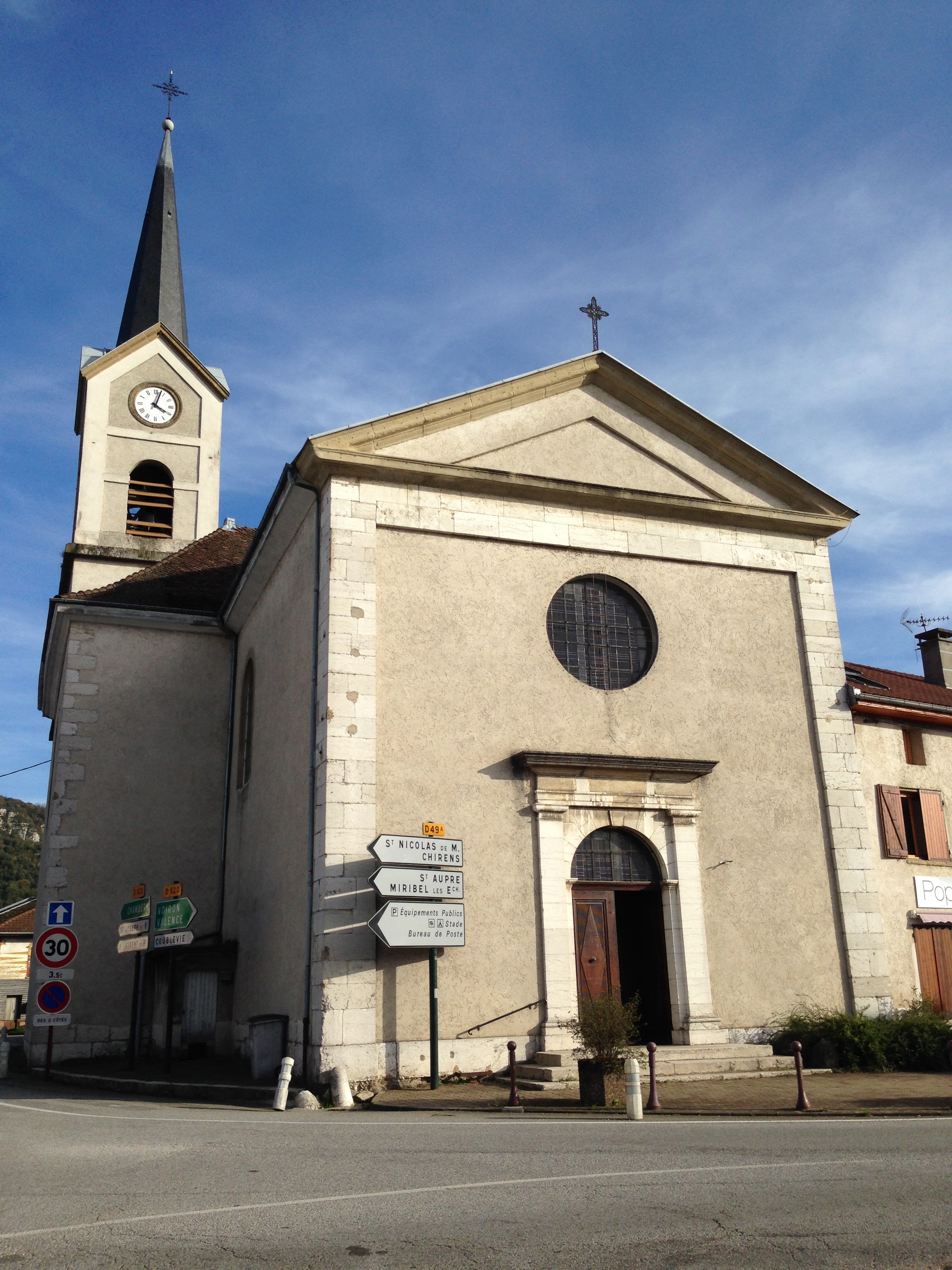 Church of St Etienne de Crossey